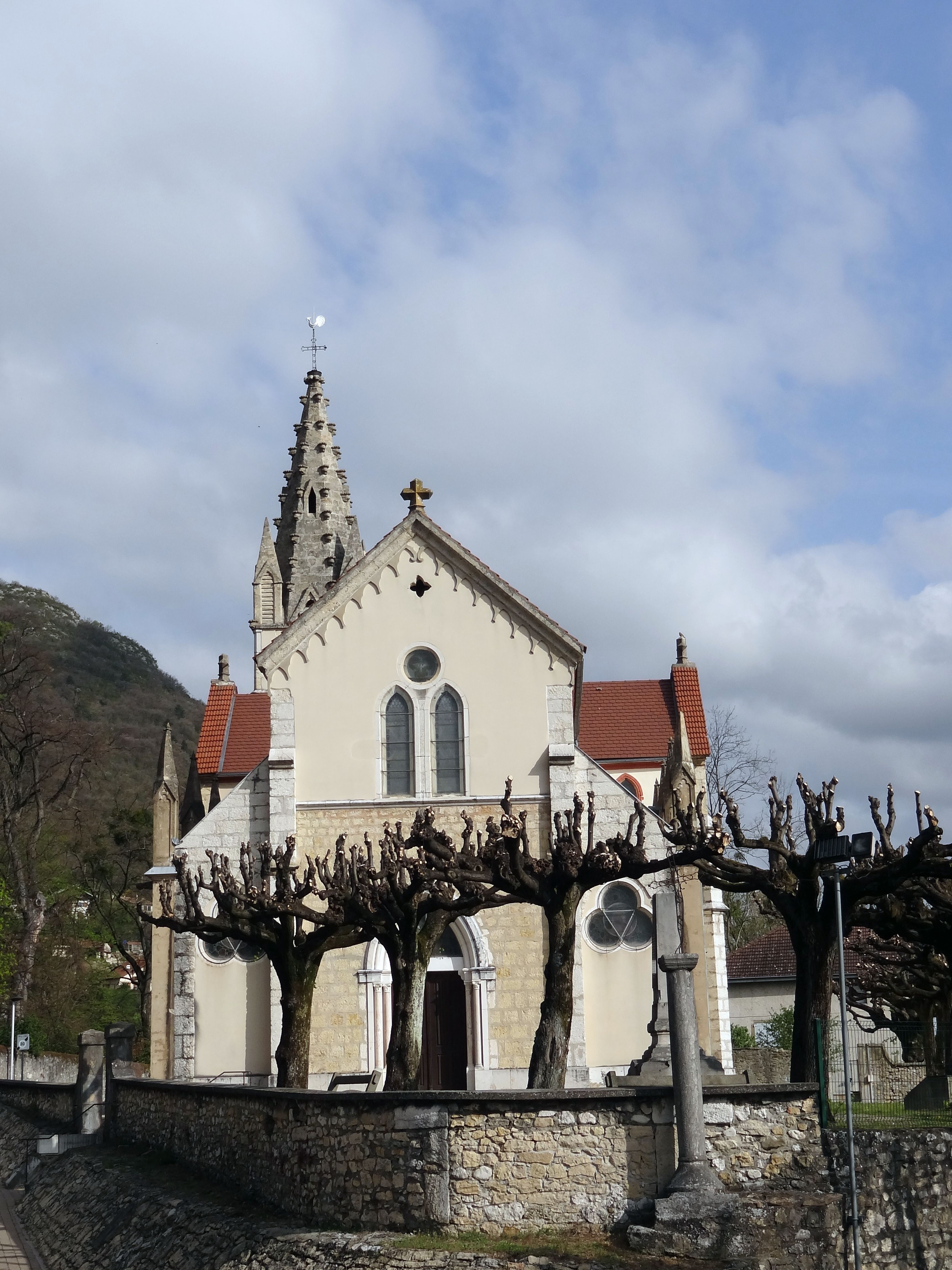 église de Veurey-Voroize